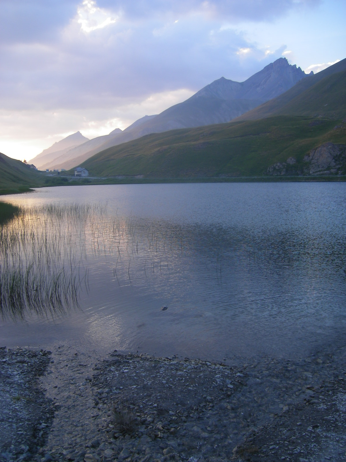 Colle della Maddalena (Argentera municipality)